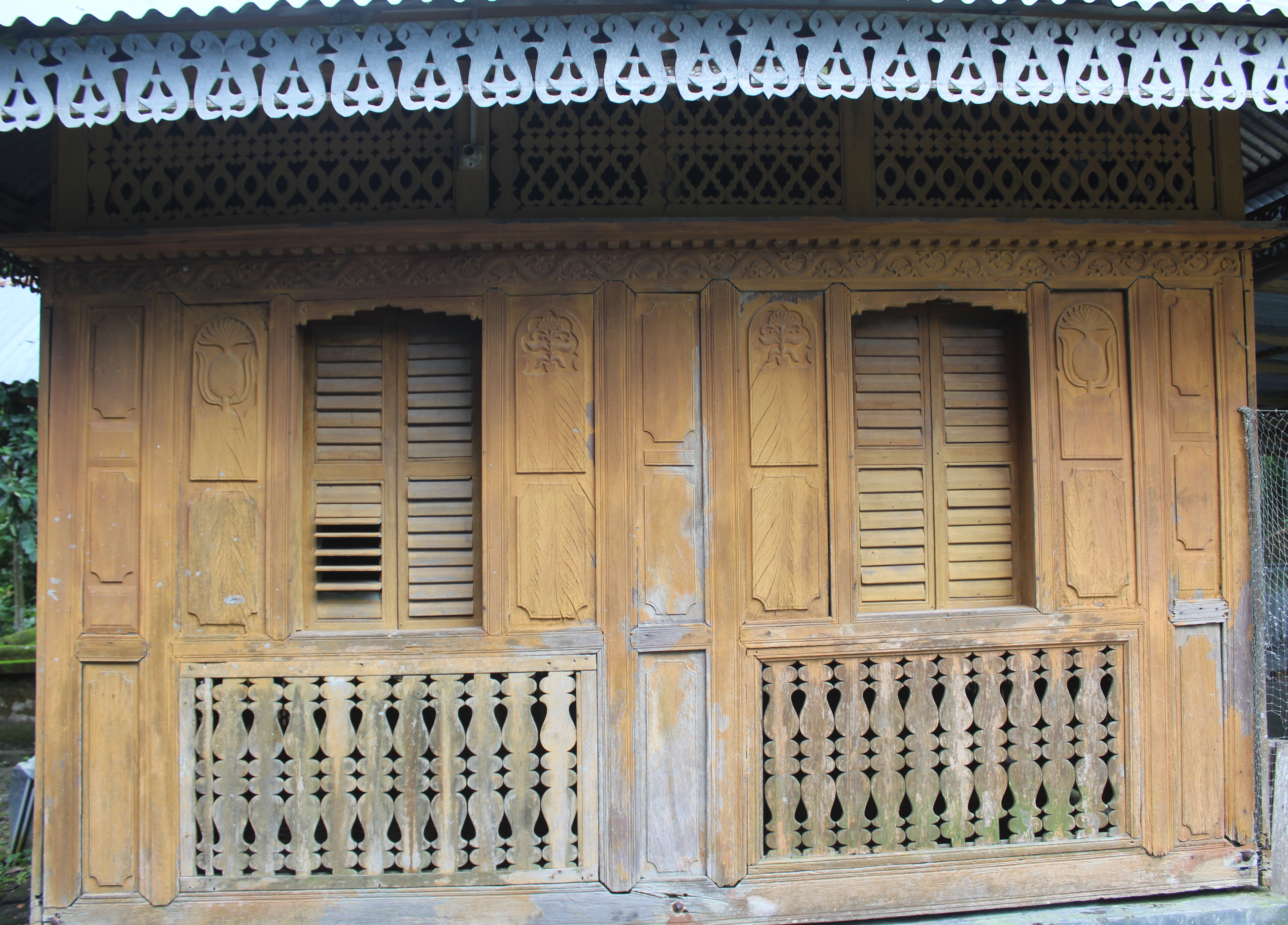 মোমিন মসজিদ